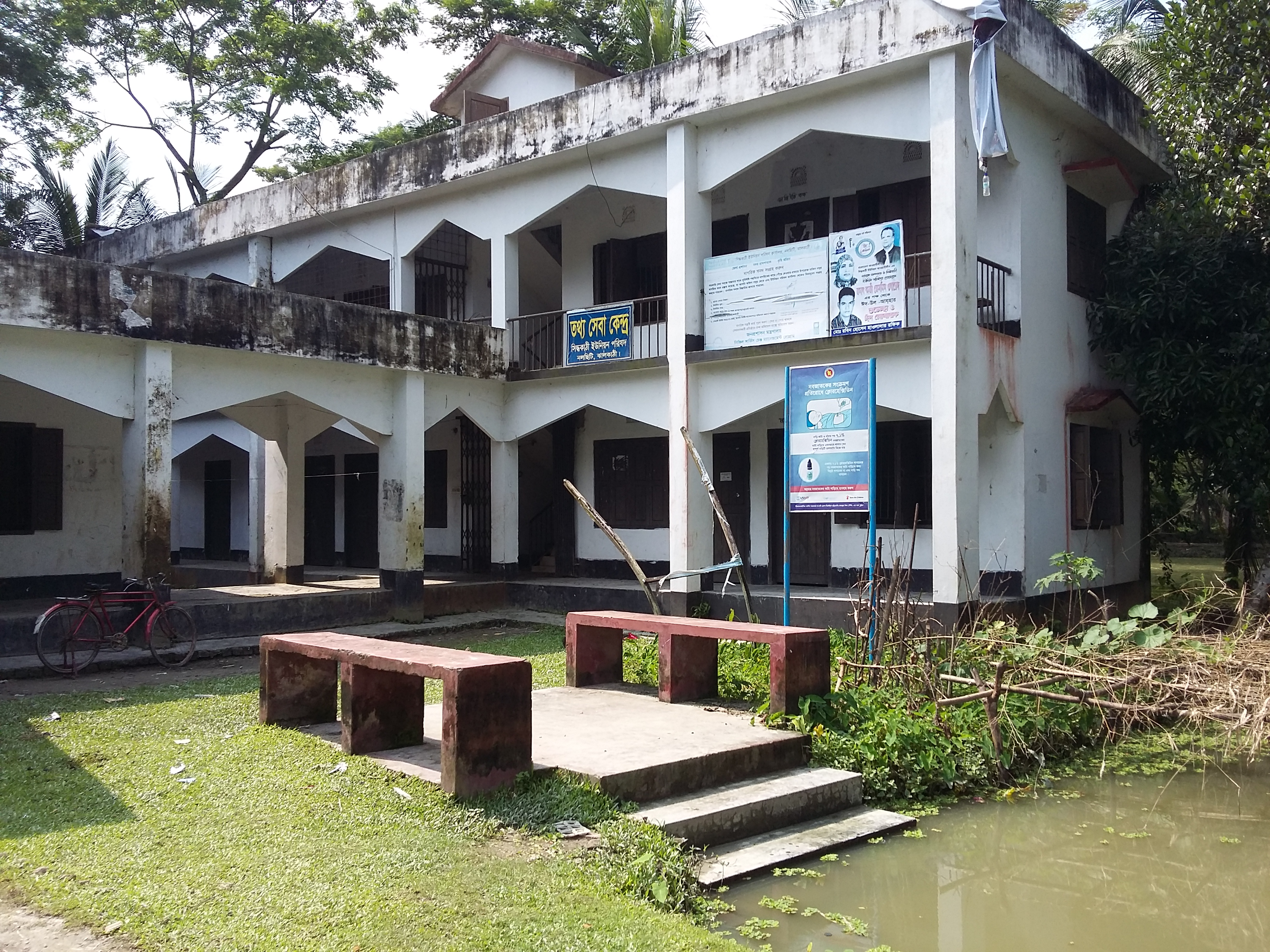 এটি ইউনিয়ন পরিষদের ছবি